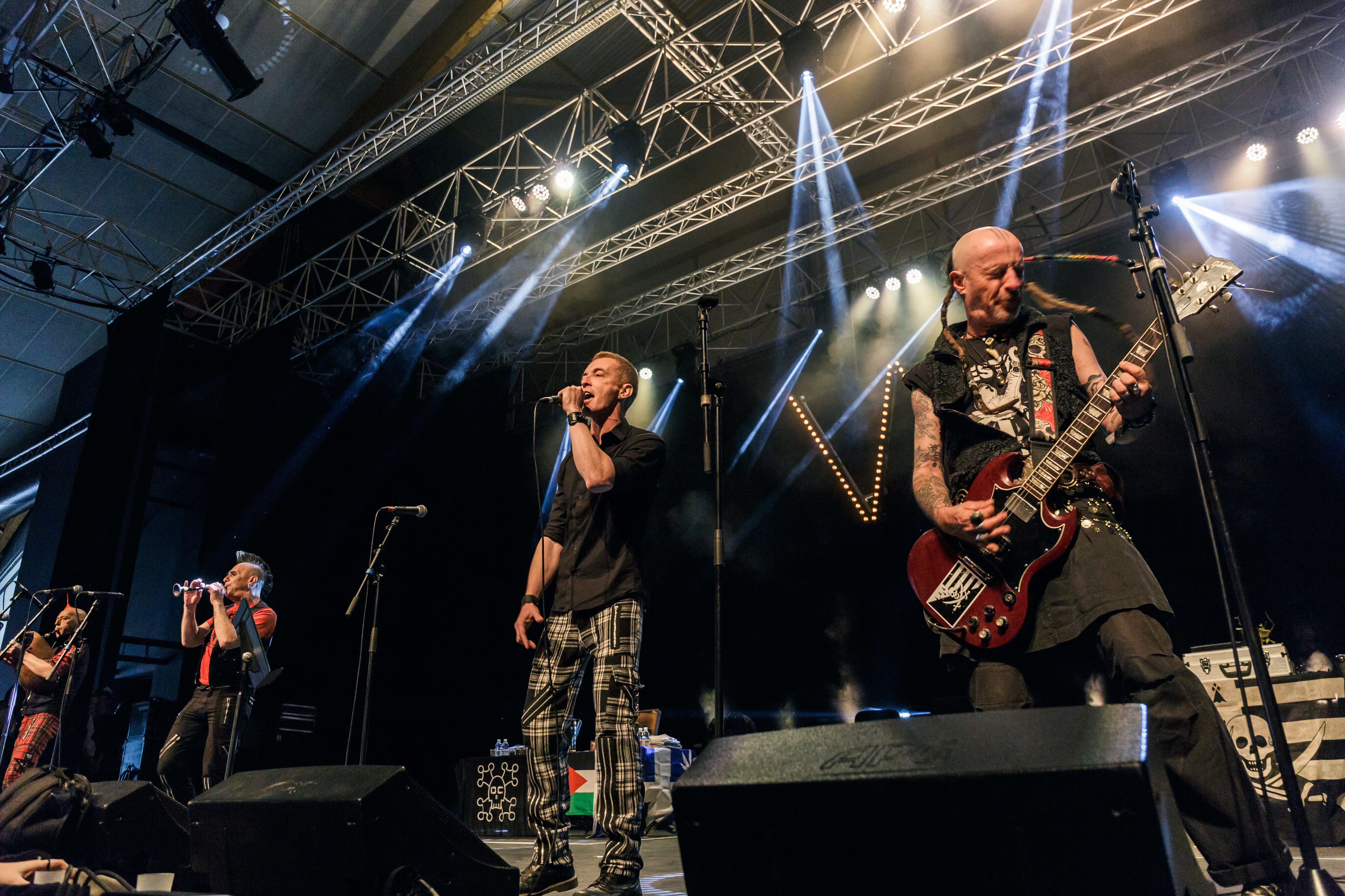 Les Ramoneurs de menhirs en fest-noz au parc des expos de Penvillers à Quimper à l'occasion des 50 ans de la confédération des cercles War'l Leur le 29 avril 2017.